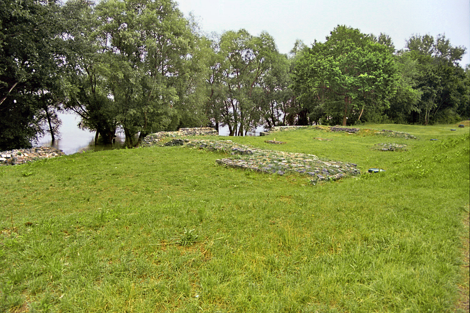 Der spätantike Burgus Szigetmonostor-Horány auf der Donauinsel Szentendrei in Ungarn. Die Aufnahme wurde im strömenden Regen gemacht.